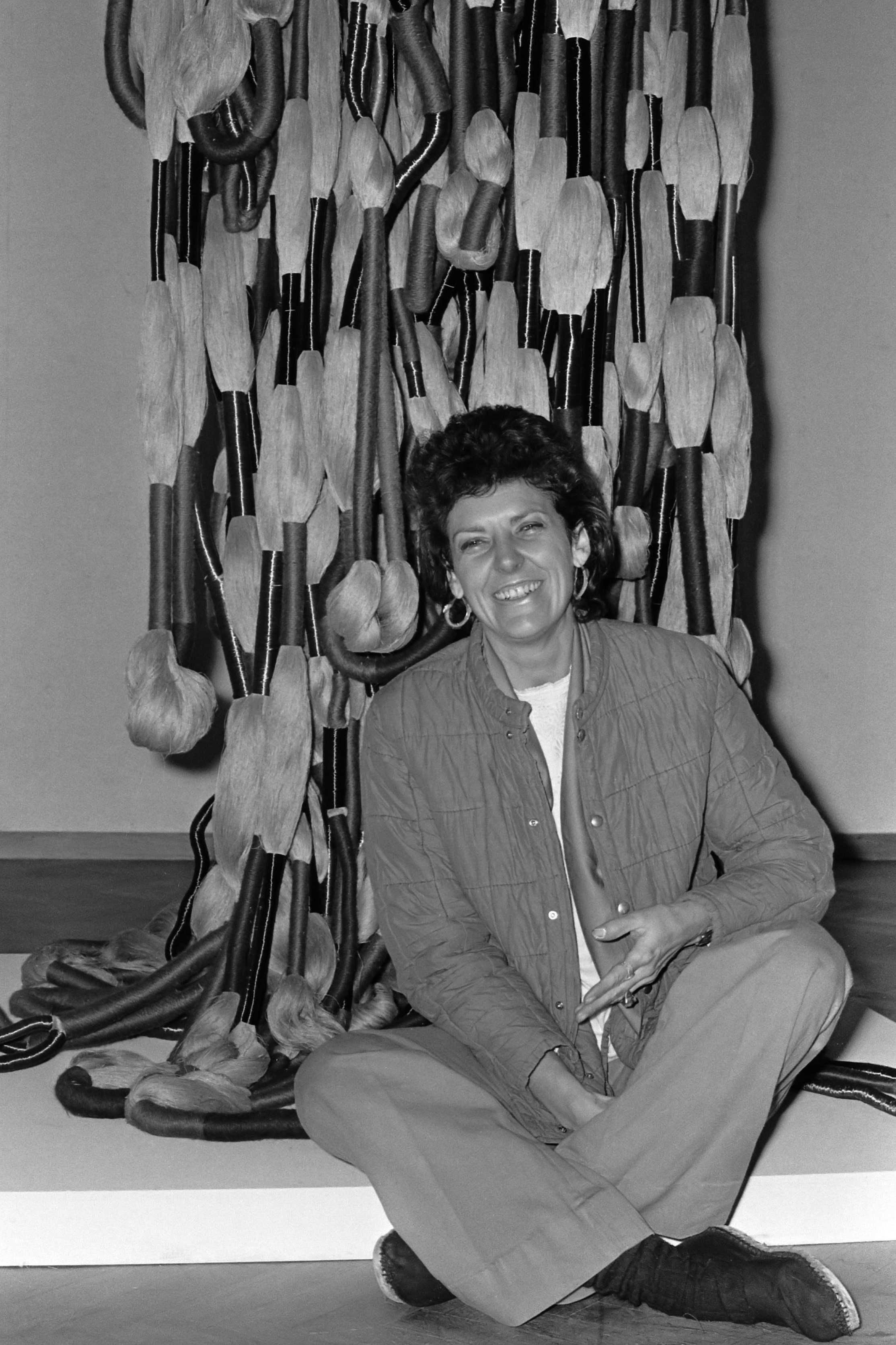 Sheila Hicks richt in het Stedelijk Museum een tentoonstelling van wandkleden en textielsculpturen in. De kunstenares voor een van haar objecten 7 februari 1974